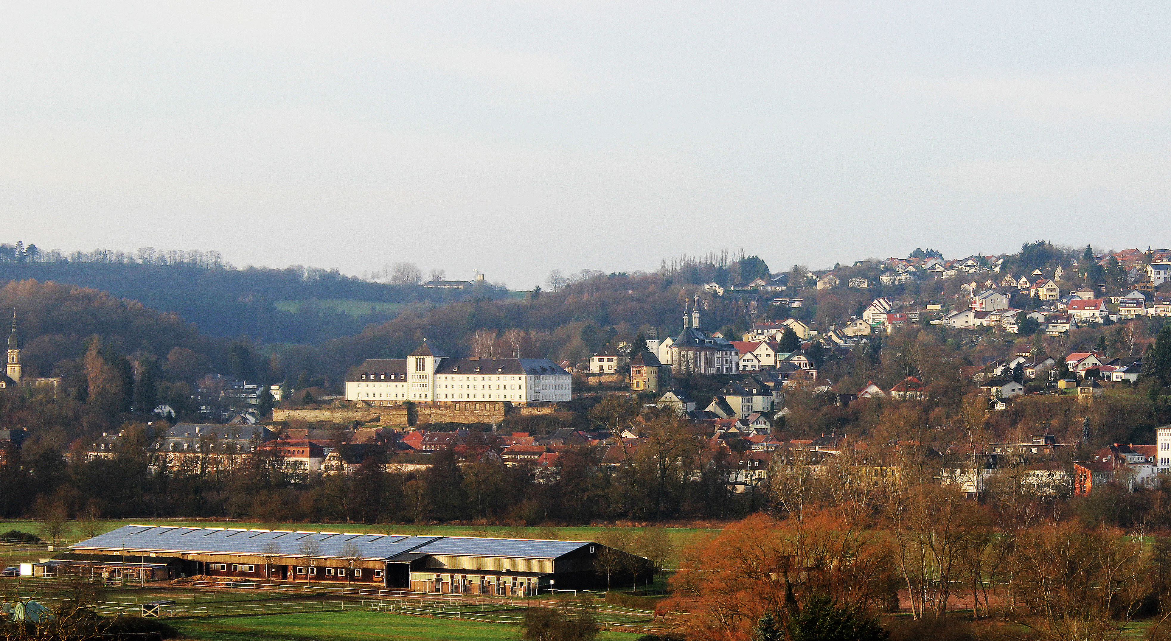 Blieskastel-Mitte im saarländischen Saarpfalz-Kreis aus östlicher Richtung vom Blieskasteler Stadtteil Webenheim aus gesehen